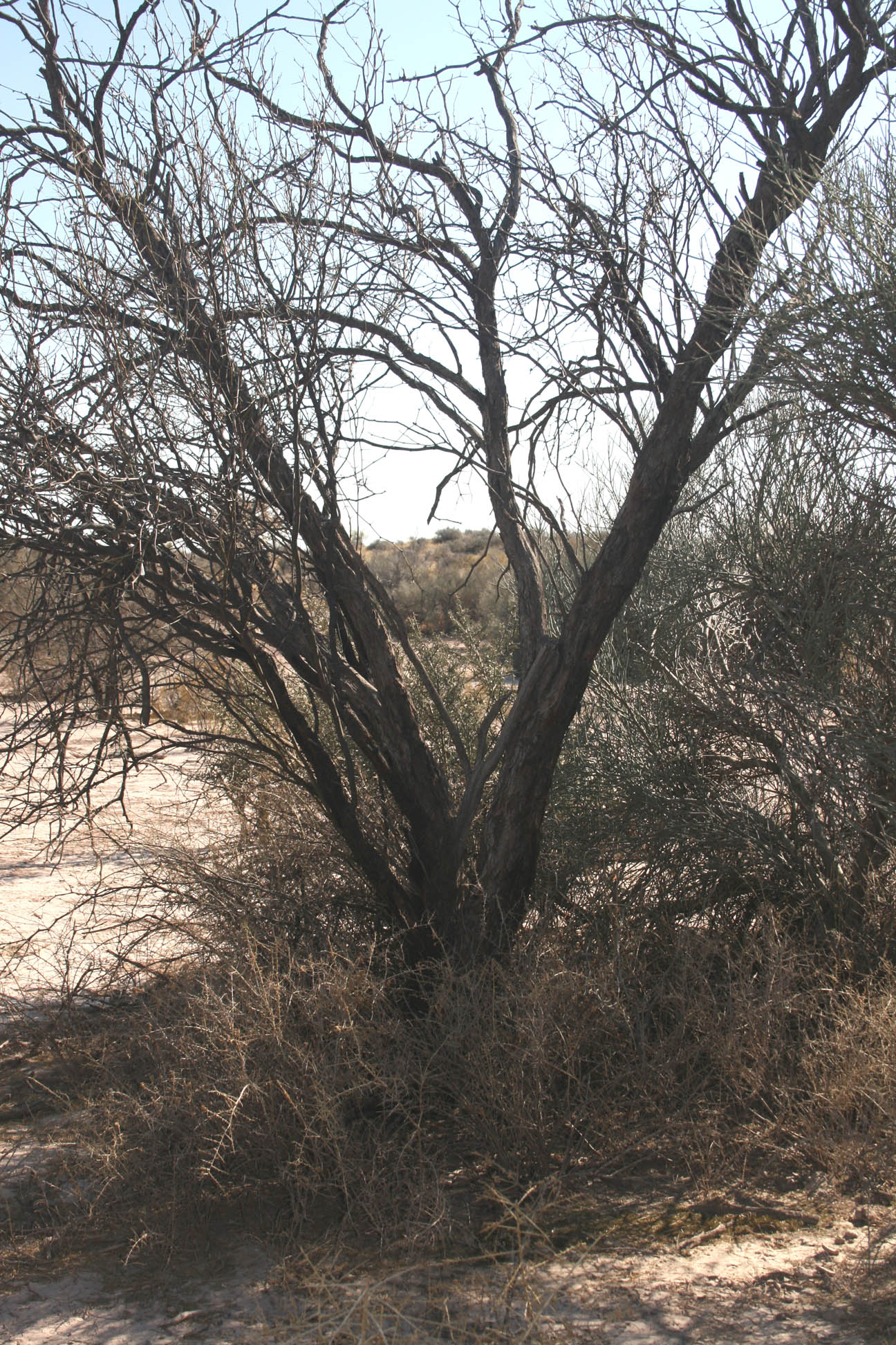 Prosopis flexuosa (algarrobo dulce), especie nativa de la Ecorregión del Monte. Fotografía tomada en la Reserva Natural Bosques Teltecas, departamento de Lavalle, provincia de Mendoza, Argentina.